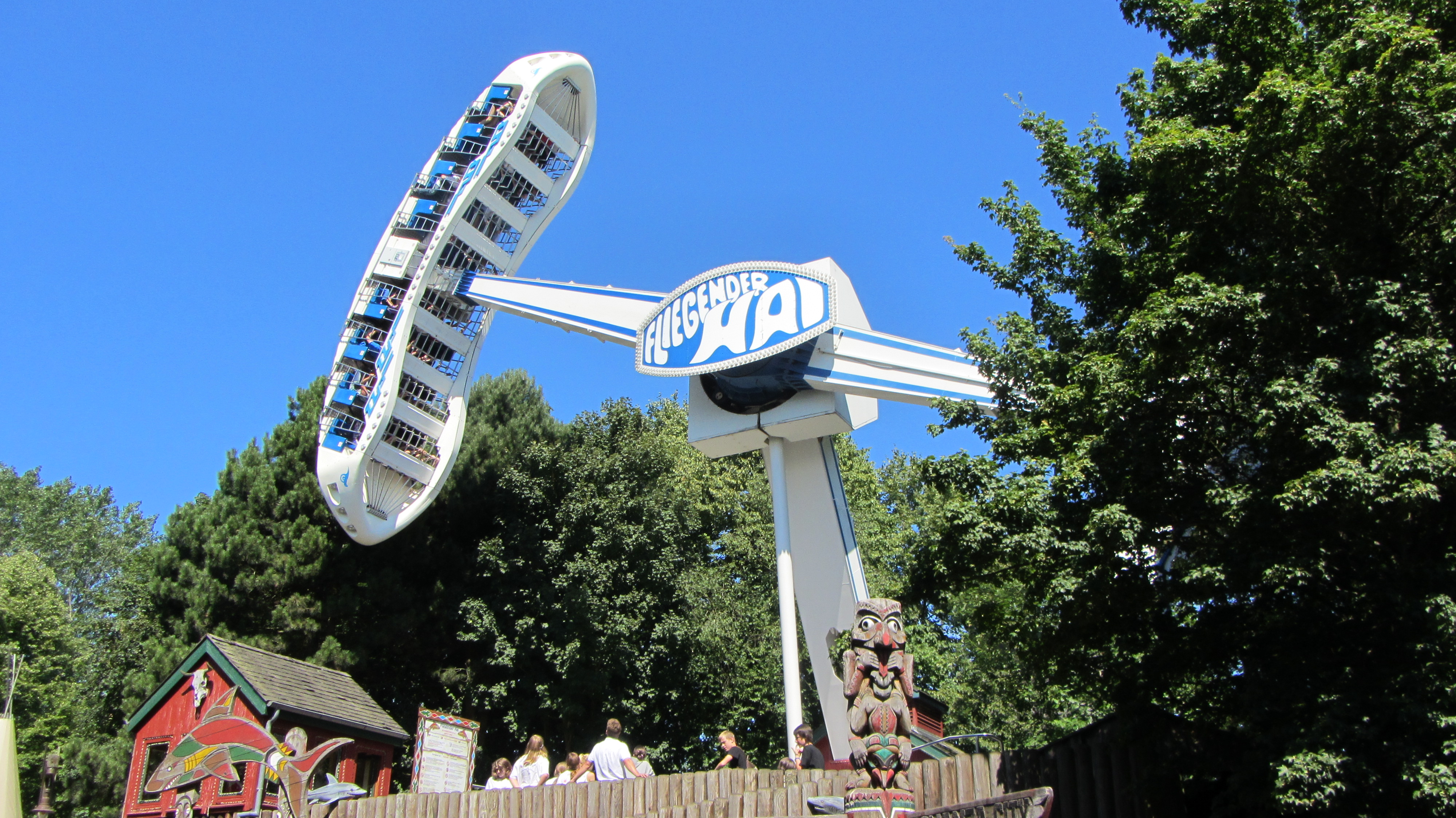 Fahrattration "Fliegender Hai" im Hansa-Park